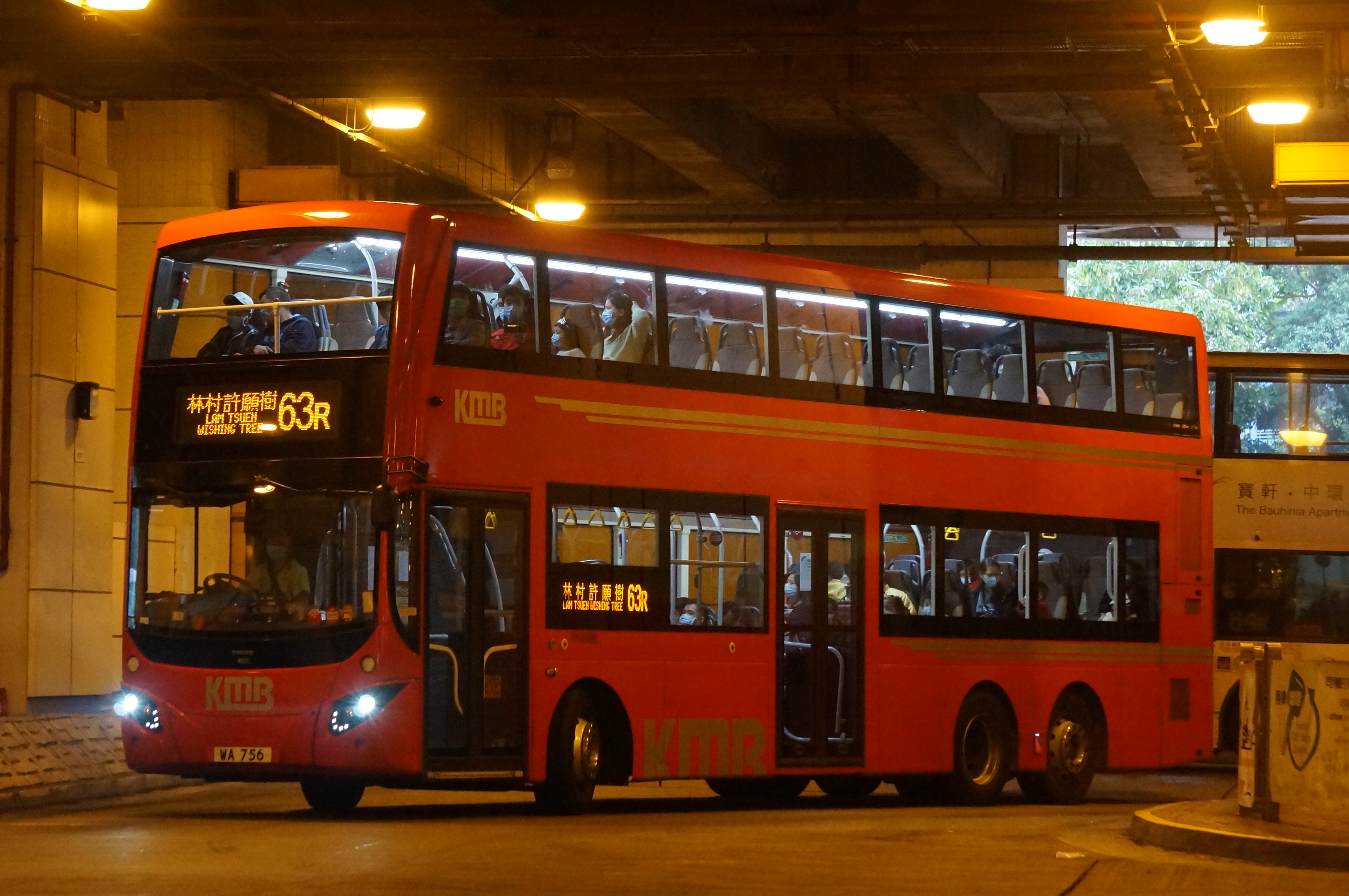 中文（香港）: WA756@63R